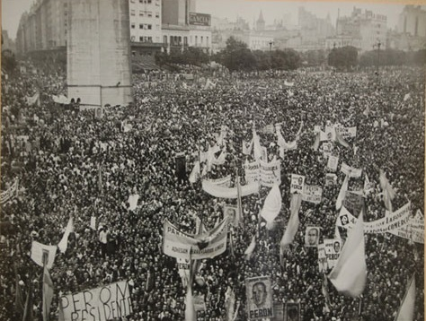 Proclama de la fórmula Perón-Quijano en febrero de 1946